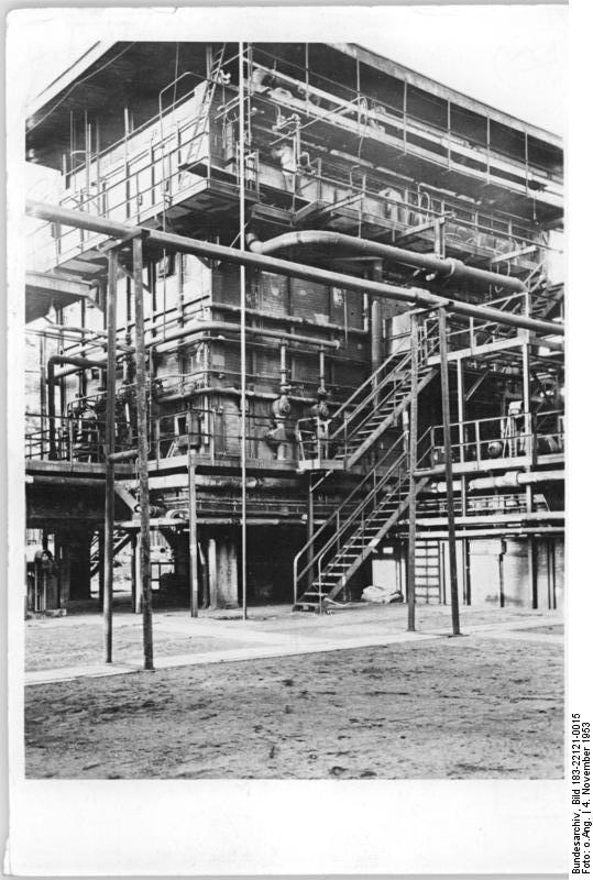 Zentralbild-4.11.1953 Re-Ho. MAG-Betriebe werden übergeben. Am 20. bis 22.8.1953 verhandelte die deutsche Regierungsdelegation in Moskau mit der sowjetischen Regierung. Bei den Besprechungen, die in einer Atmosphäre tiefer Freundschaft und voller Gleichberechtigung der beiden Staaten geführt wurden, kam die Regierung der UdSSR zu dem Entschluß, die 33 SAG-Betriebe, die sich noch auf dem Territorium der Deutschen Demokratischen Republik befinden, dem deutschen Volk ab 1.1.1954 kostenlos zu übergeben. UBz: Werk "Schwarzheide" in Schwarzheide (Leusitz)-Die Spaltanlage.- "